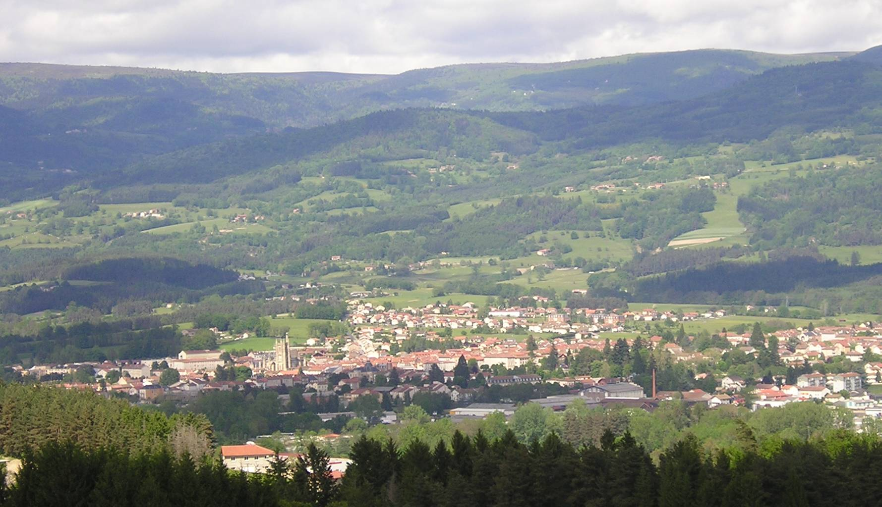 Photo d'Ambert dans le Puy de Dome